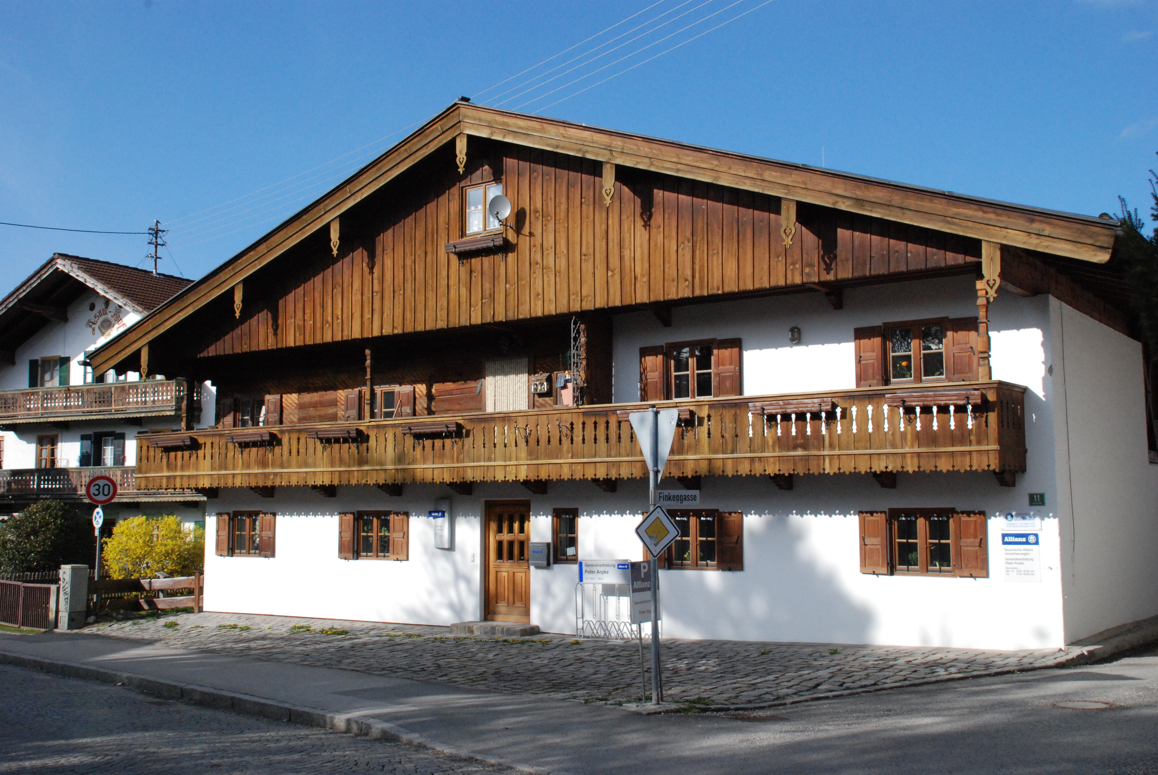 Ehemaliges Bauernhaus in der Dorfstraße 11 in Benediktbeuern, Landkreis Bad Tölz-Wolfratshausen, Regierungsbezirk Oberbayern, Bayern. Als Baudenkmal unter Aktennummer D-1-73-113-18 in der Bayerischen Denkmalliste aufgeführt.